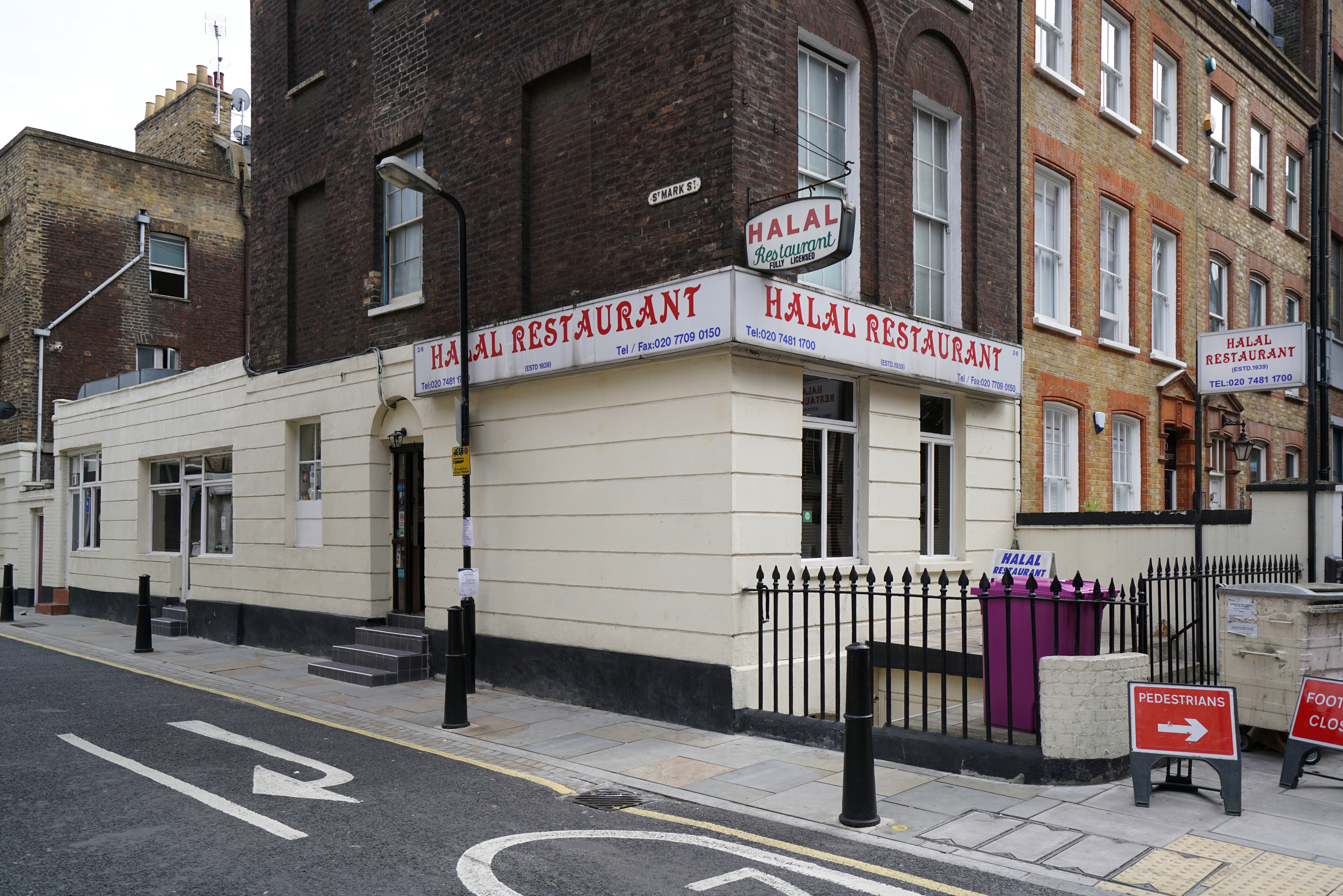 Ein Restaurant in London (Stadtteil Whitechapel) namens „Halal Restaurant“, in dem Halāl-Produkte angeboten werden